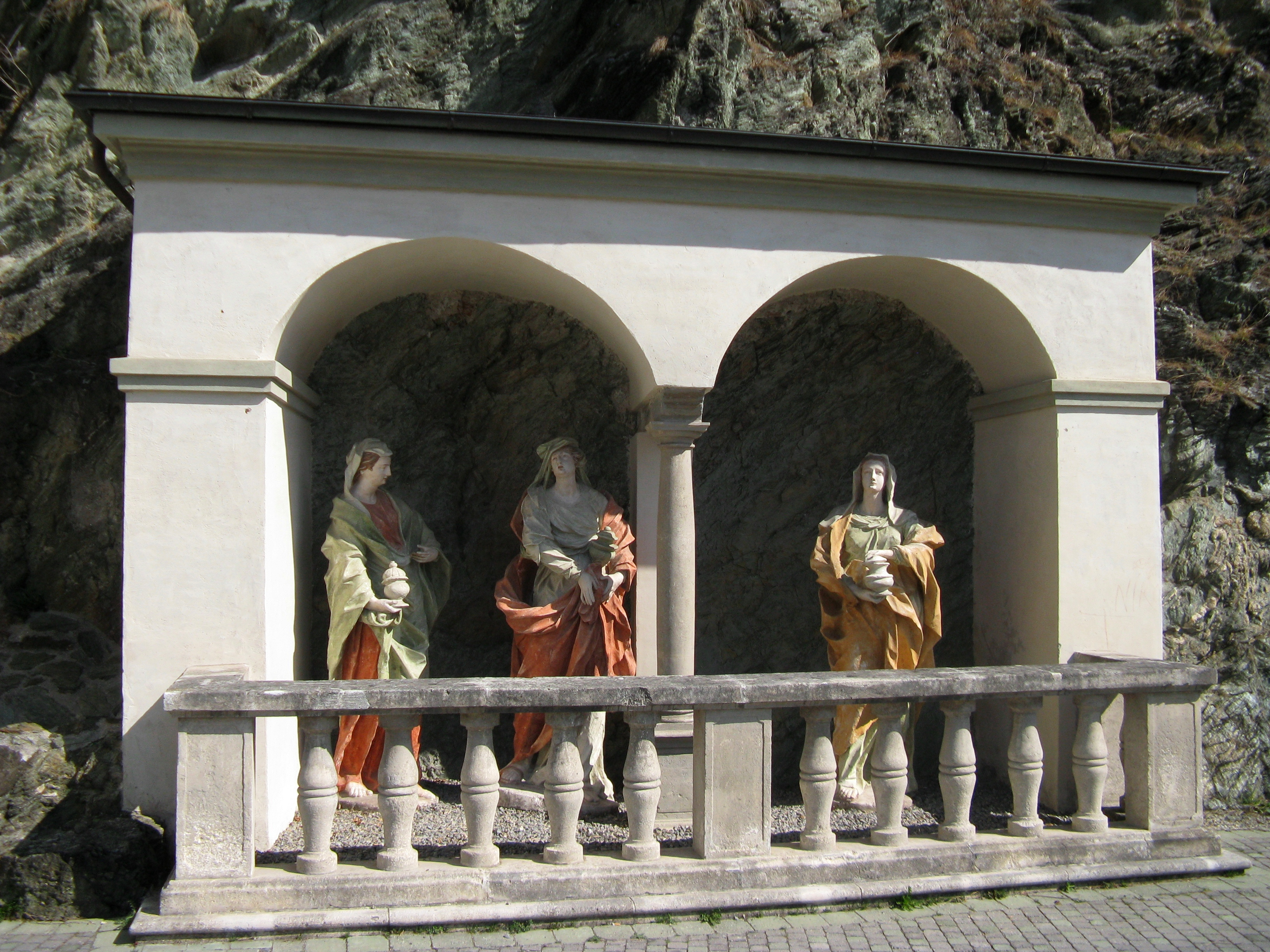 Grazer Kalvarienberg, Gruppe der drei Marien